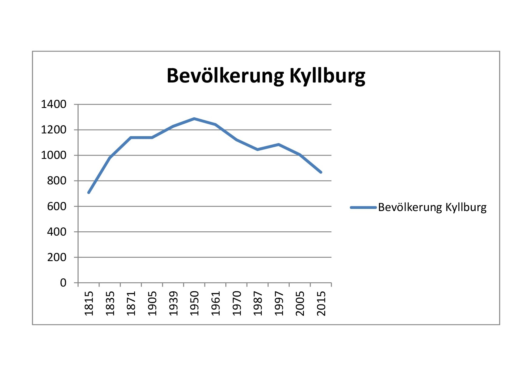 54655 Kyllburg. Grafische Entwicklung der Bevölkerung. Stand 2015.